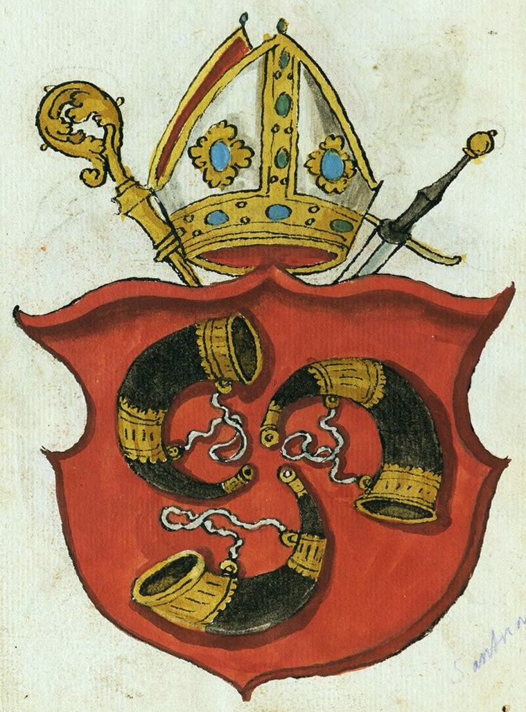 Беларуская (тарашкевіца): Герб Войцеха Радзівіла (Vojciech Radzivił) «Трубы» («Truby»)